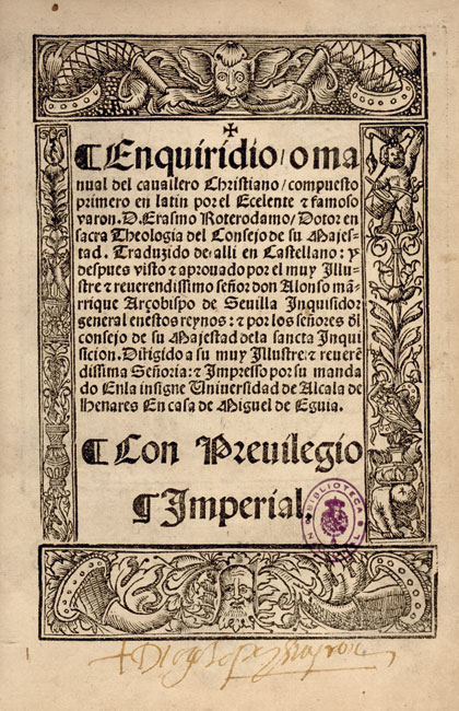 Enchiridion militis christiani (1504), edizione spagnola Enquiridio o manual del caballero Christiano con traduzione di Alonso Fernandez, Miguel de Eguia 1528